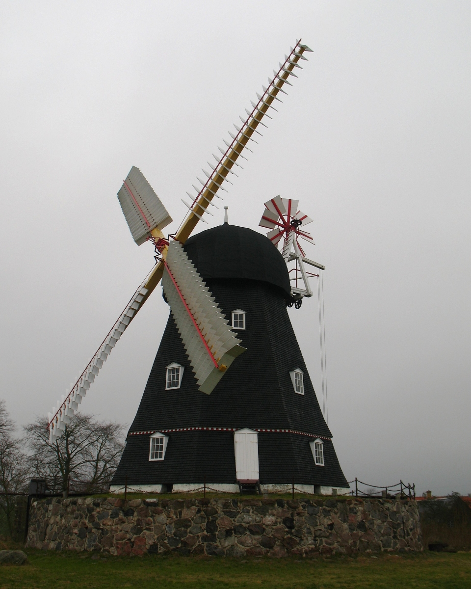 Grubbe Vindmölle, Grubbe Møllegyden2 - 5600 Faaborg Eget foto, Noorse Licentie: CC-BY-SA-3.0 Forminsket versjon for Wikipedia